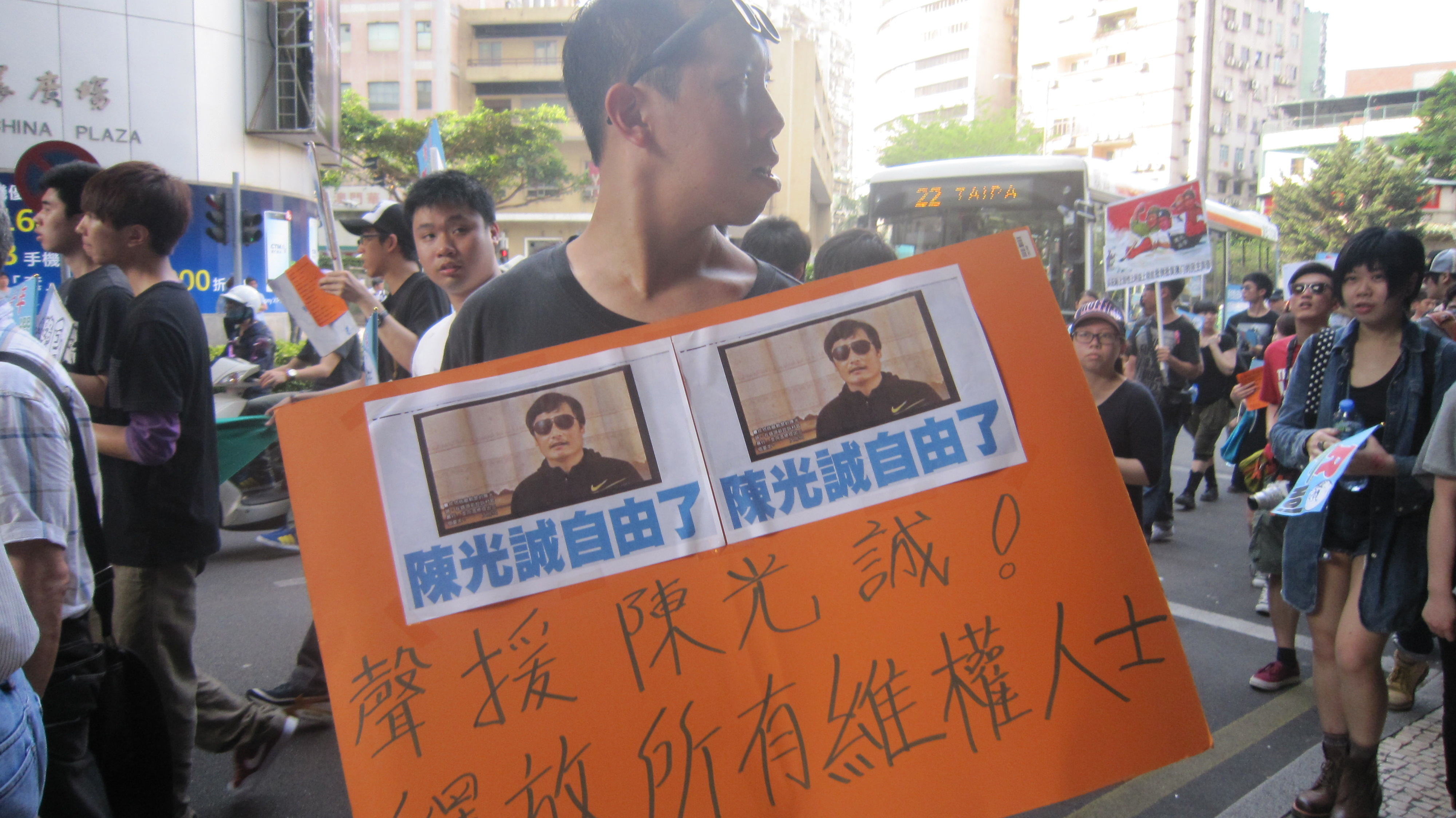 Procissão em 1 de Maio de 2012 em Macau